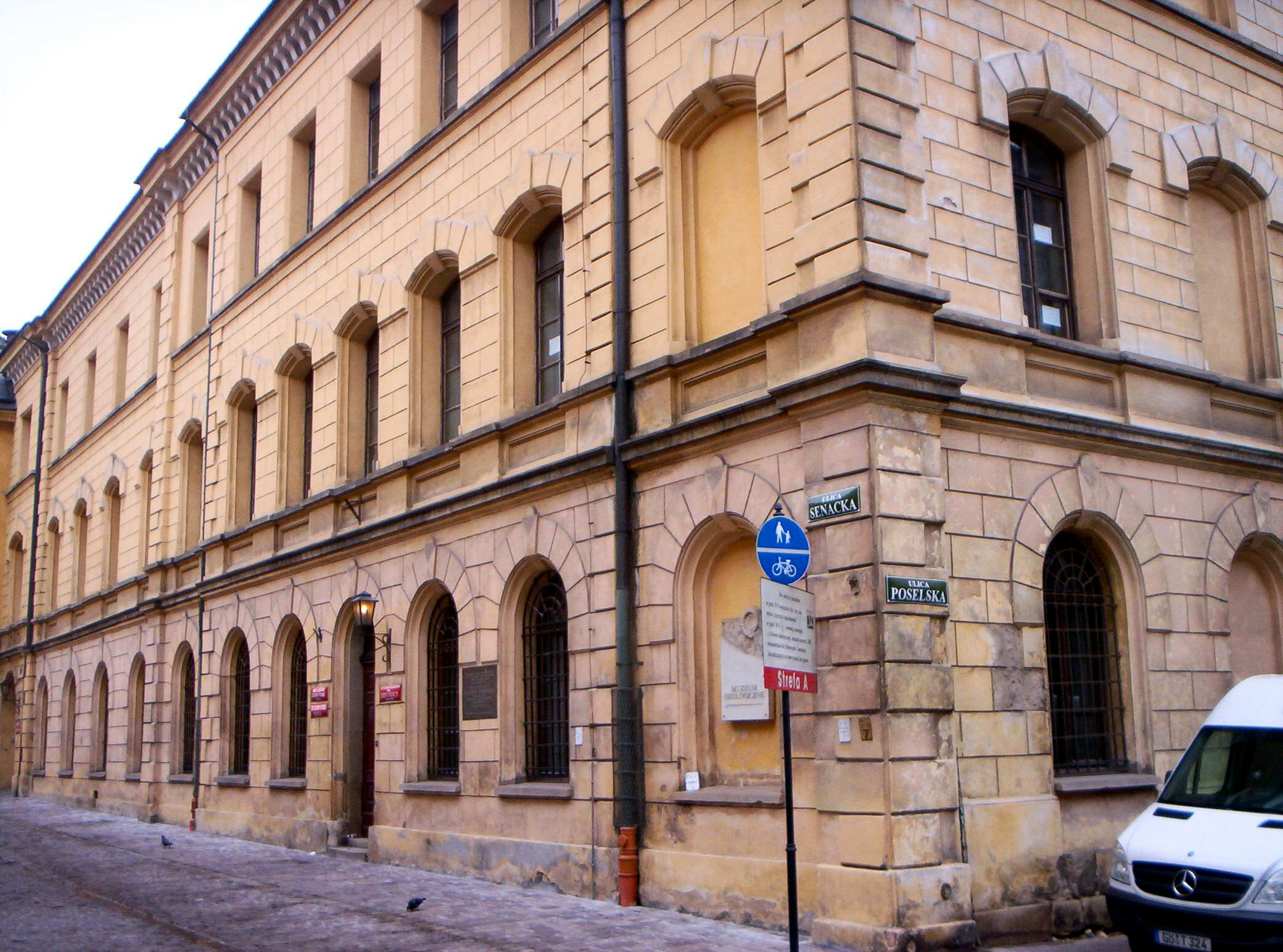 Muzeum Geologiczne Instytutu Nauk Geologicznych PAN w Krakowie